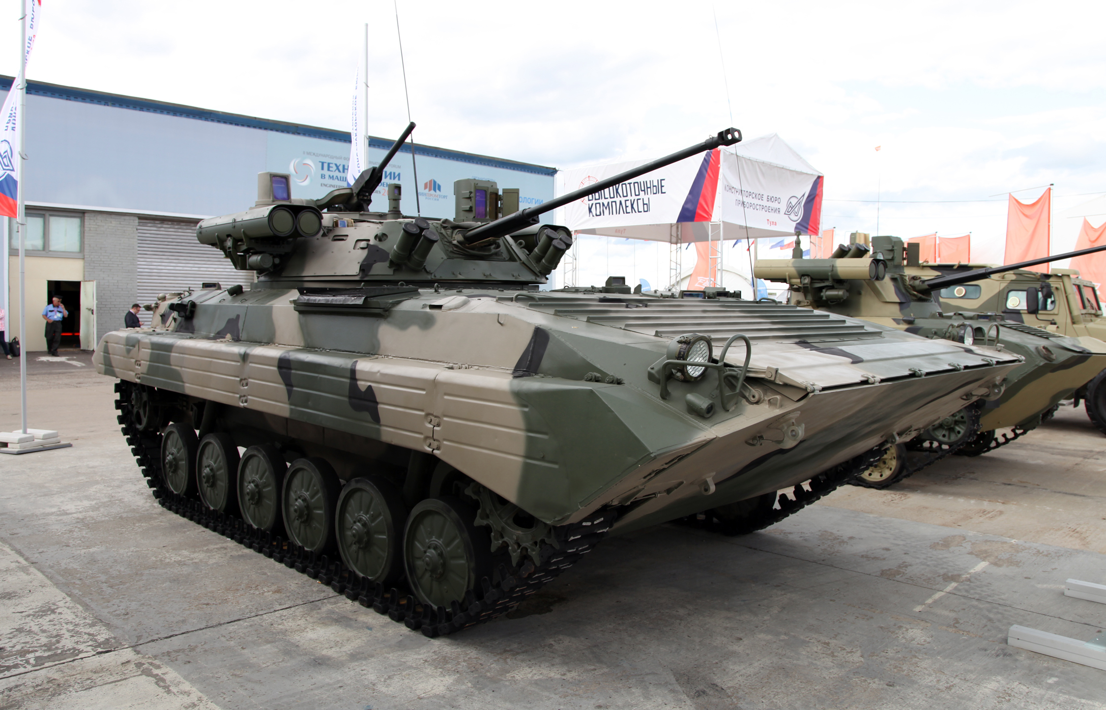 БМП-2 с модернизированным боевым отделением (BMP-2 with upgraded fighting compartment)